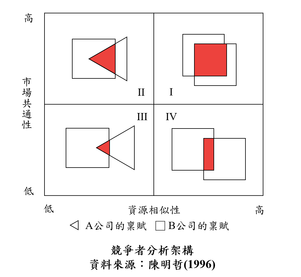 中文（台灣）: 市場共通性─資源相似性(MC-RS架構) 陳明哲2013